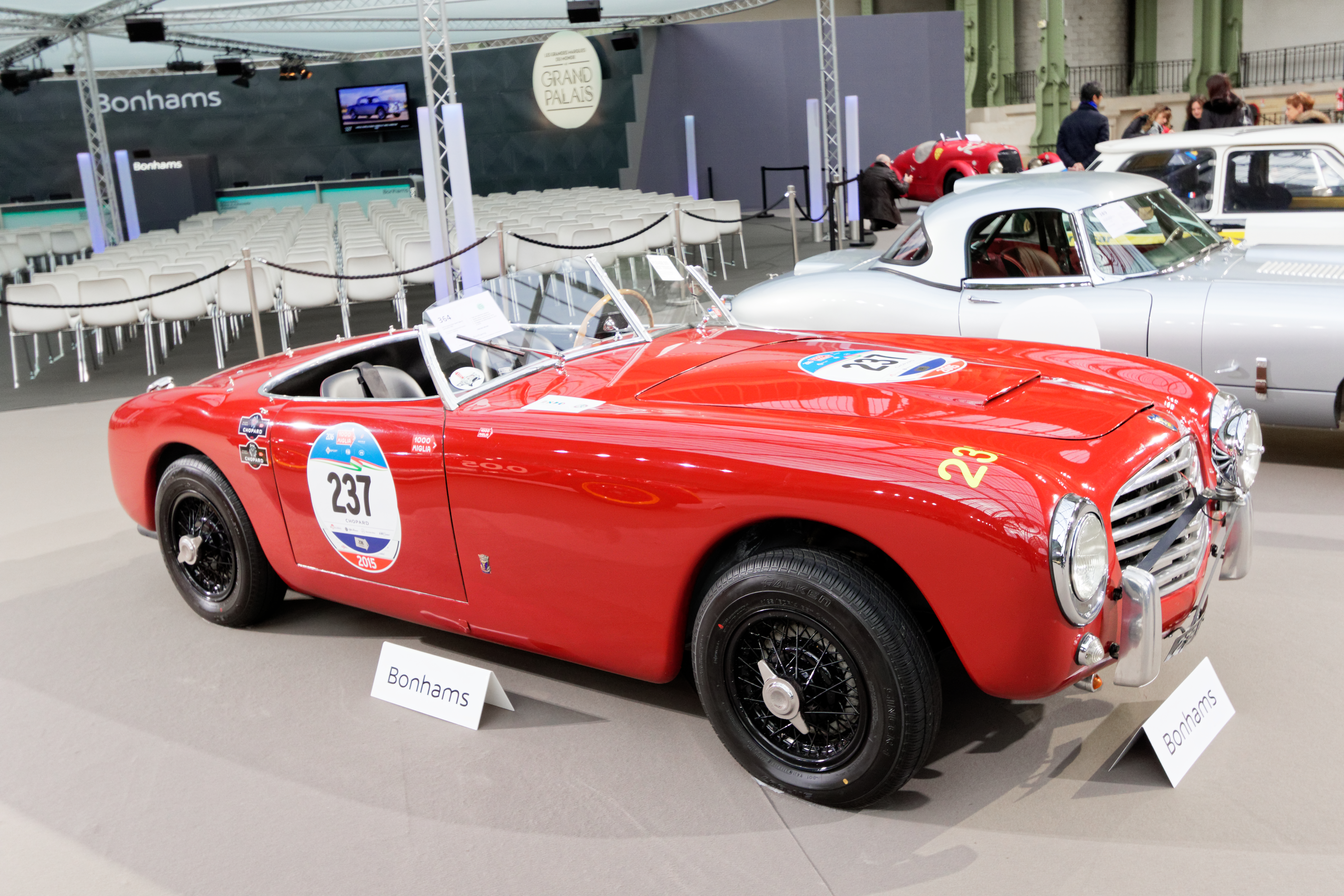 Un des véhicules présenté lors de la vente aux enchères Bonhams 2017 au Grand Palais de Paris.